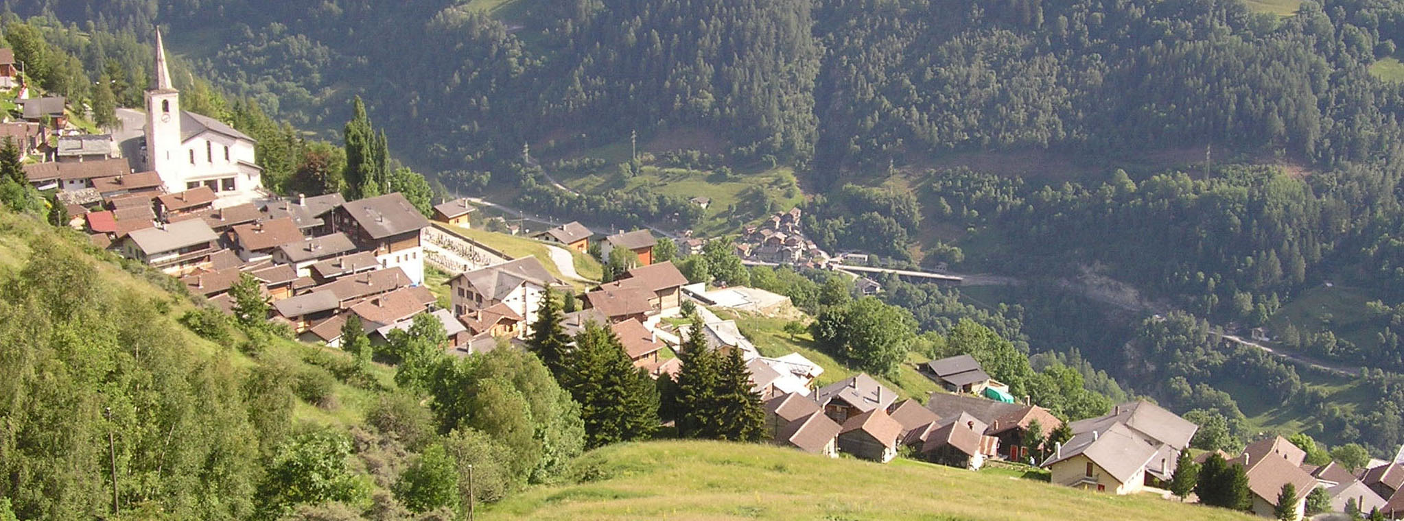 Village de Saint-Martin, dans le val d'Hérens, Valais, Suisse